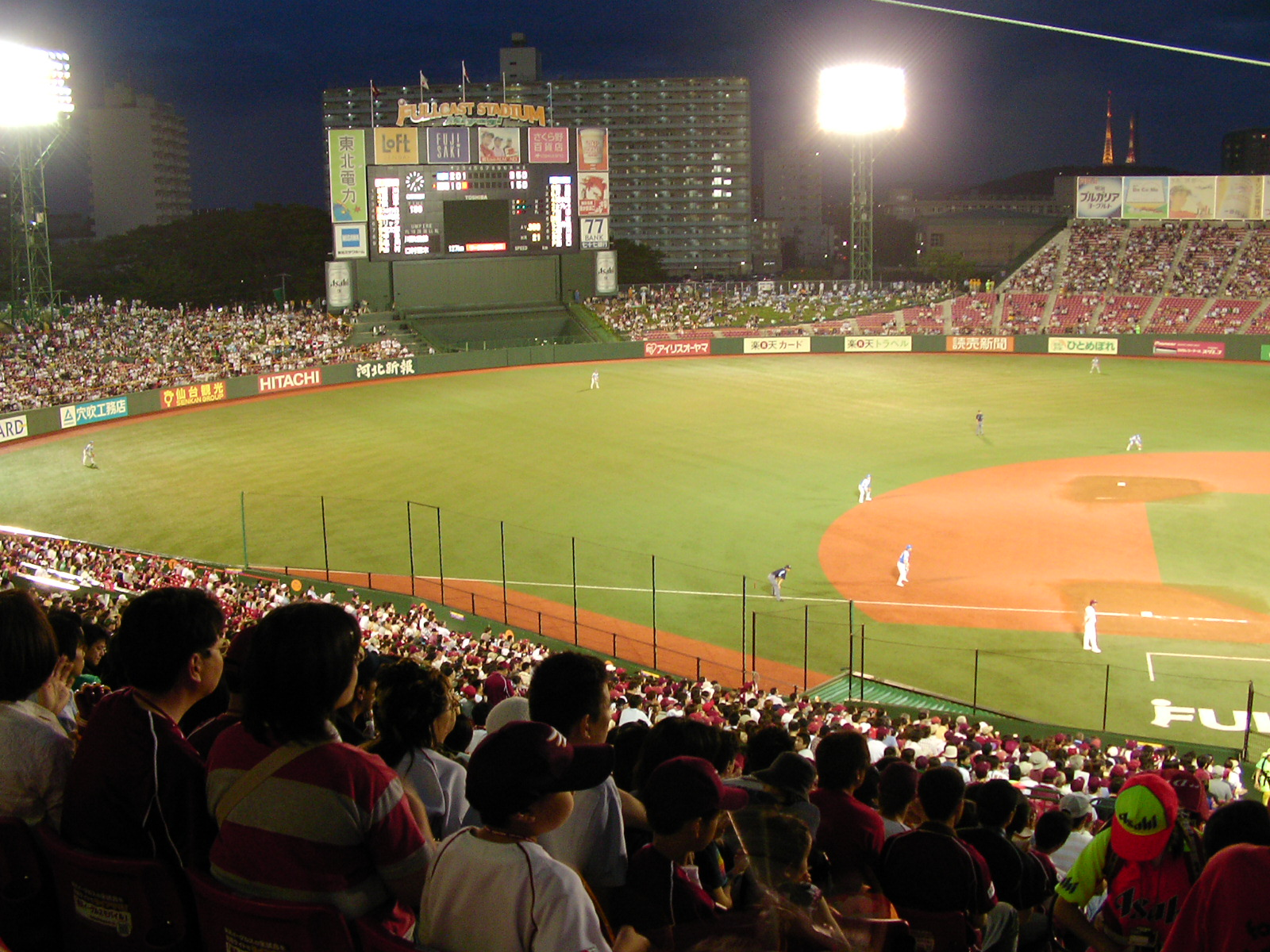 Sendai Miyagi kyuzyo 2006 07 宮城球場